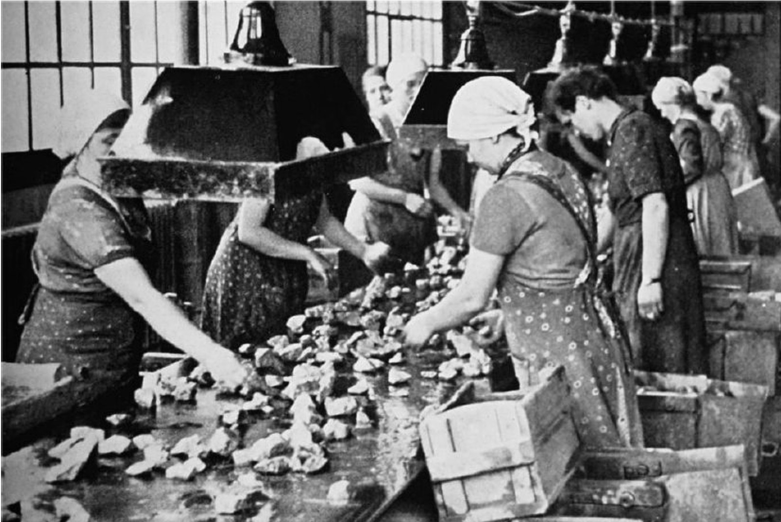 Frauen am Leseband (Klaubeband) zum manuellem aussortieren von Eisenerzen und Bergen. Grube Große Burg in Altenseelbach. Abbildung aus Archiv Karl Heupel.